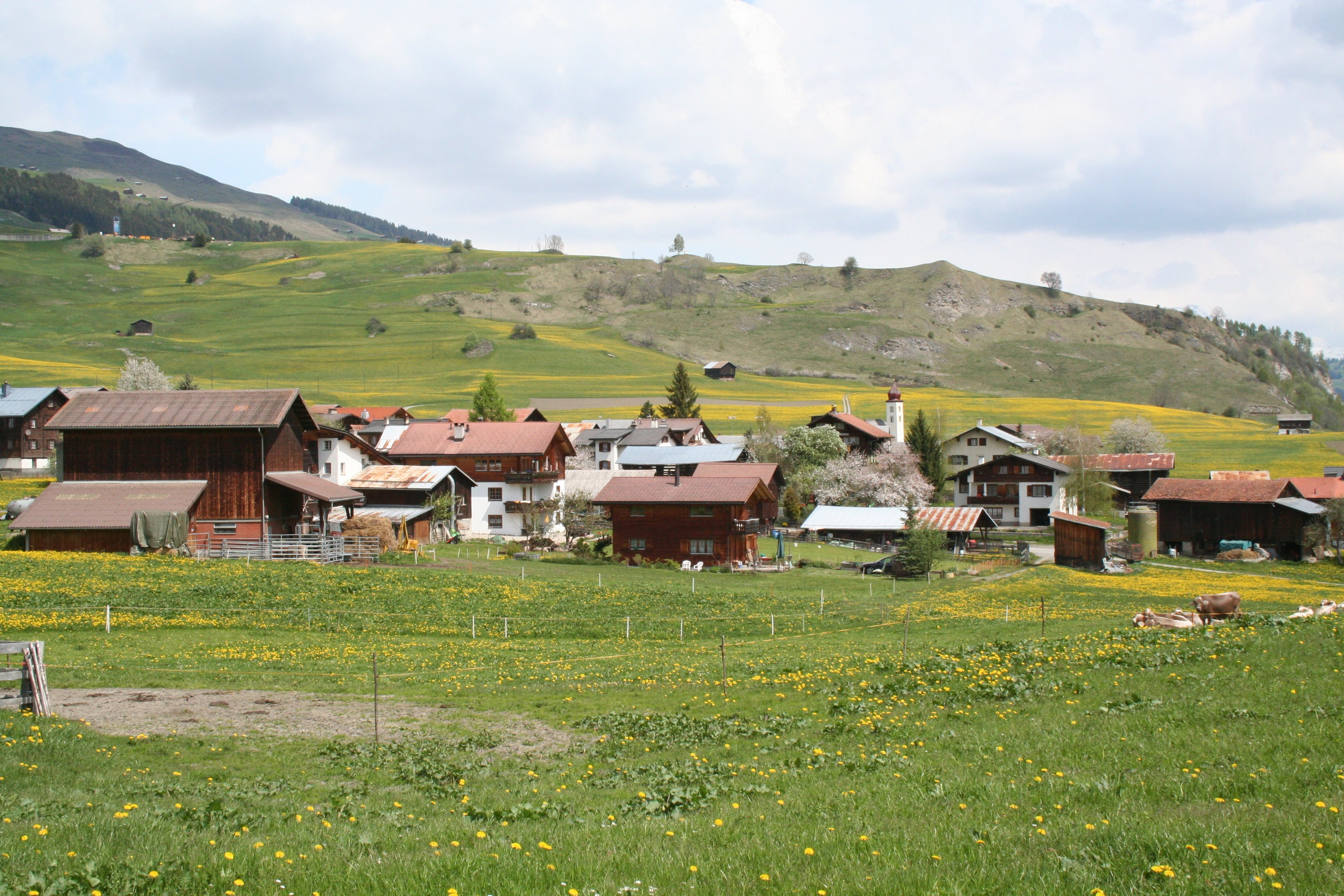 Degen GR